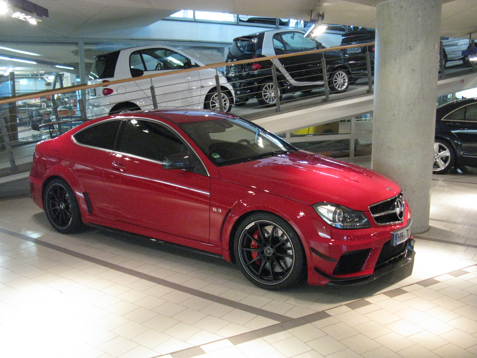 Mercedes-Benz C63 AMG Black Series